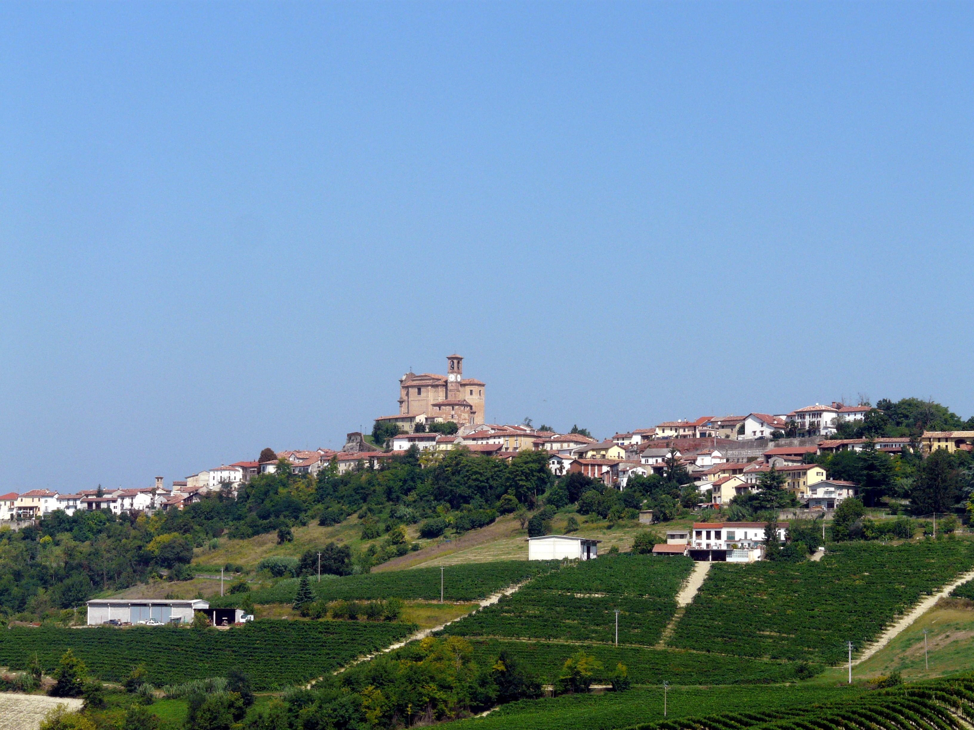 Treville, Piemonte, Italia